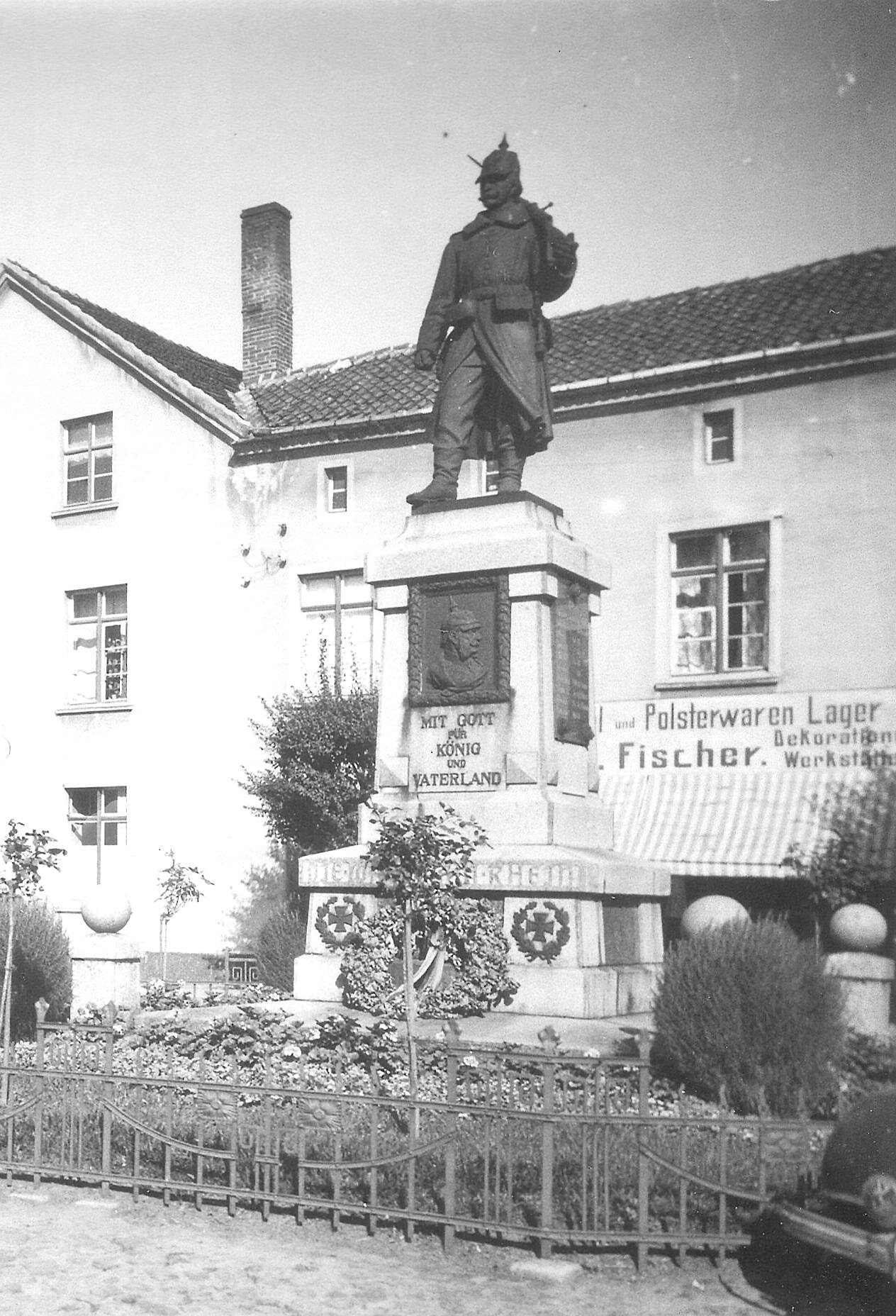 Kriegerdenkmal 1870/71 mit Kriegerfigur und Reliefbild Kaiser Wilhelms I. in Riesenburg/ Westpreußen